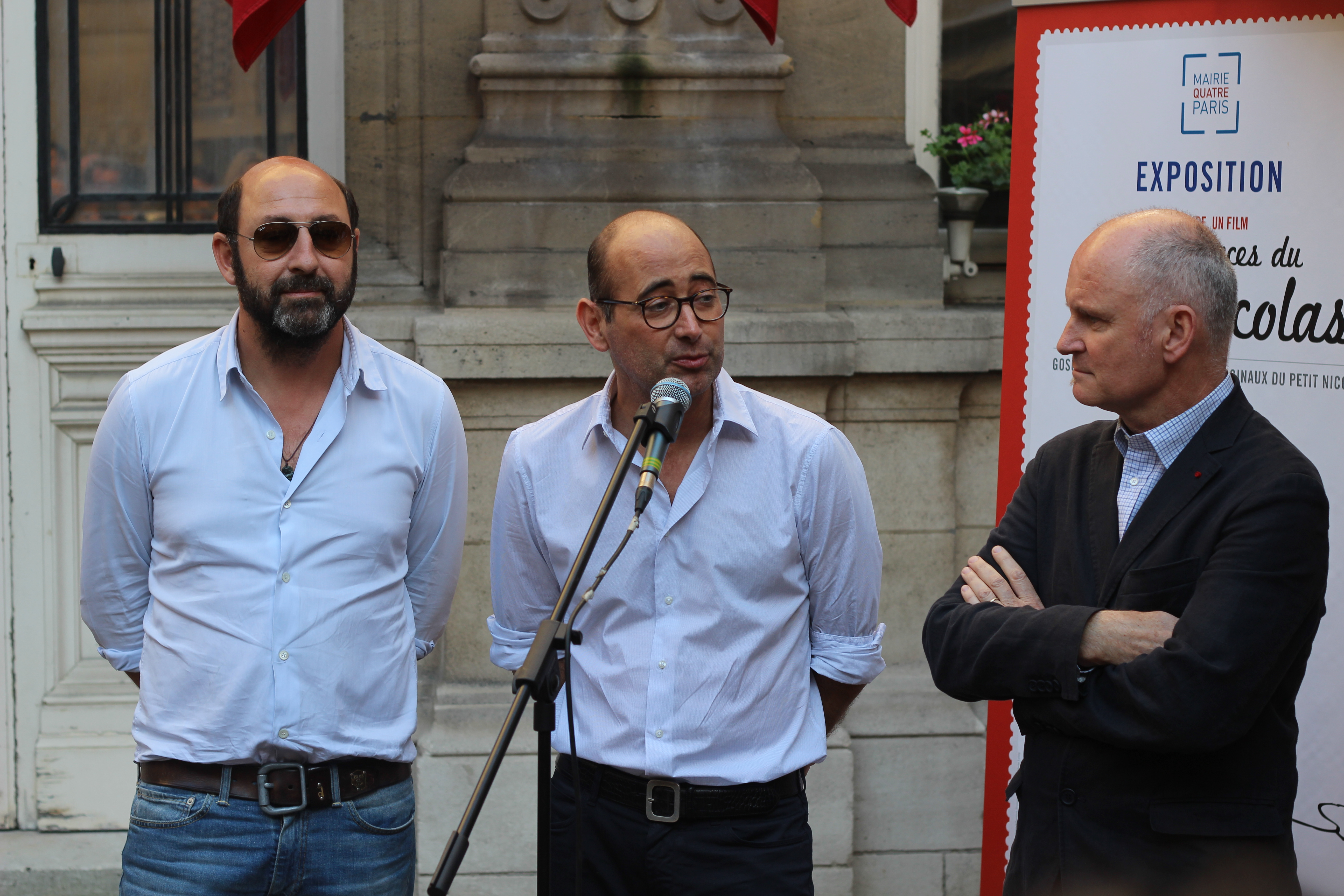 Expo Petit Nicolas - Mairie du IVe, Paris